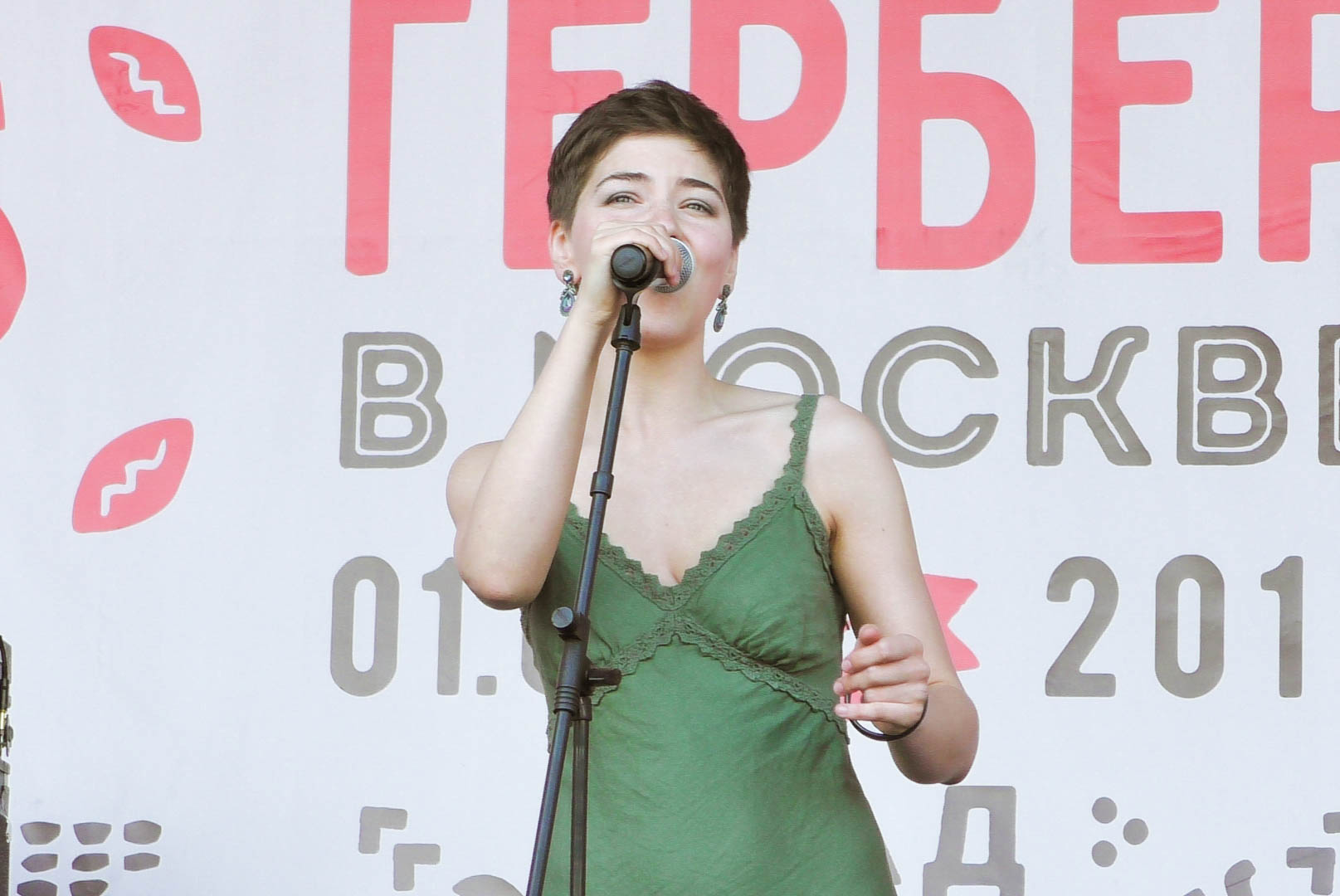 Татьяна Зыкина. Москва, сад "Эрмитаж" 01.07.2017.